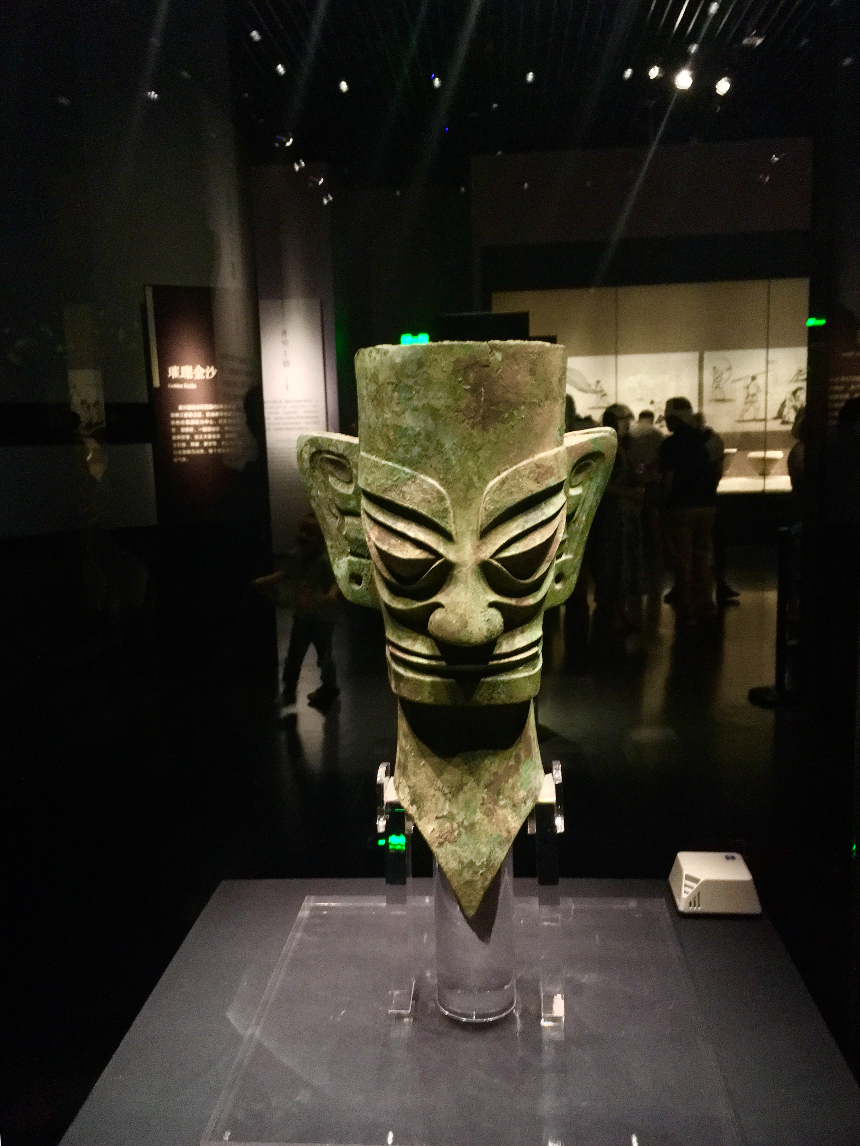 iPhone SE 拍摄